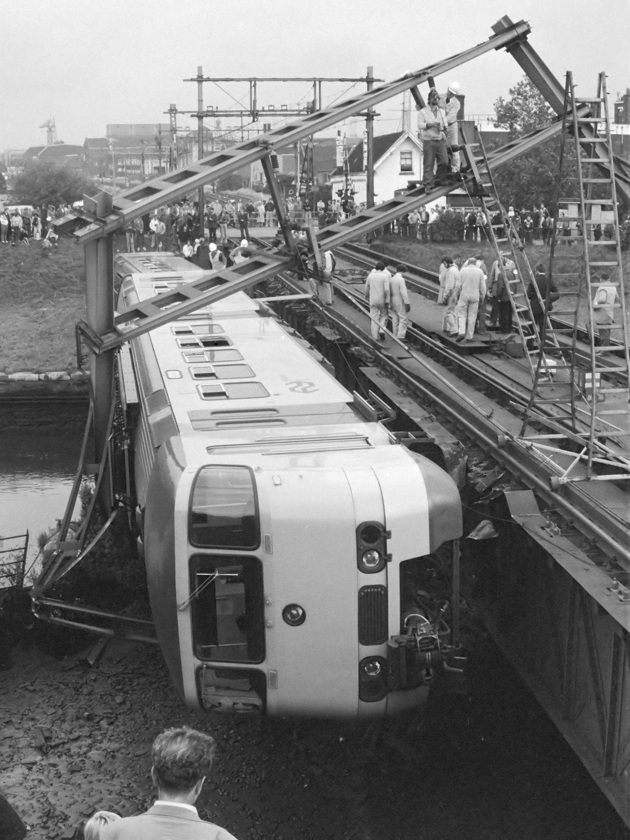 Treinontsporing bij de spoorbrug van station Vlaardingen. Gekantelde trein met rechts de spoorbrug, 15 september 1980.